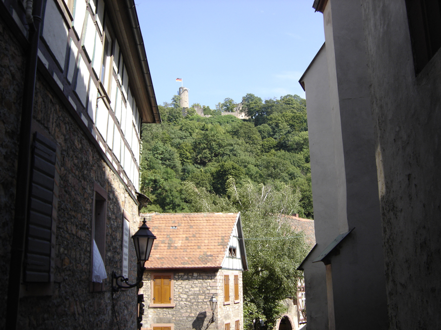 Bildbeschreibung: Weinheim mit Burg Windeck Quelle: selbst fotografiert Fotograf/Zeichner: MSeses Datum: 2005